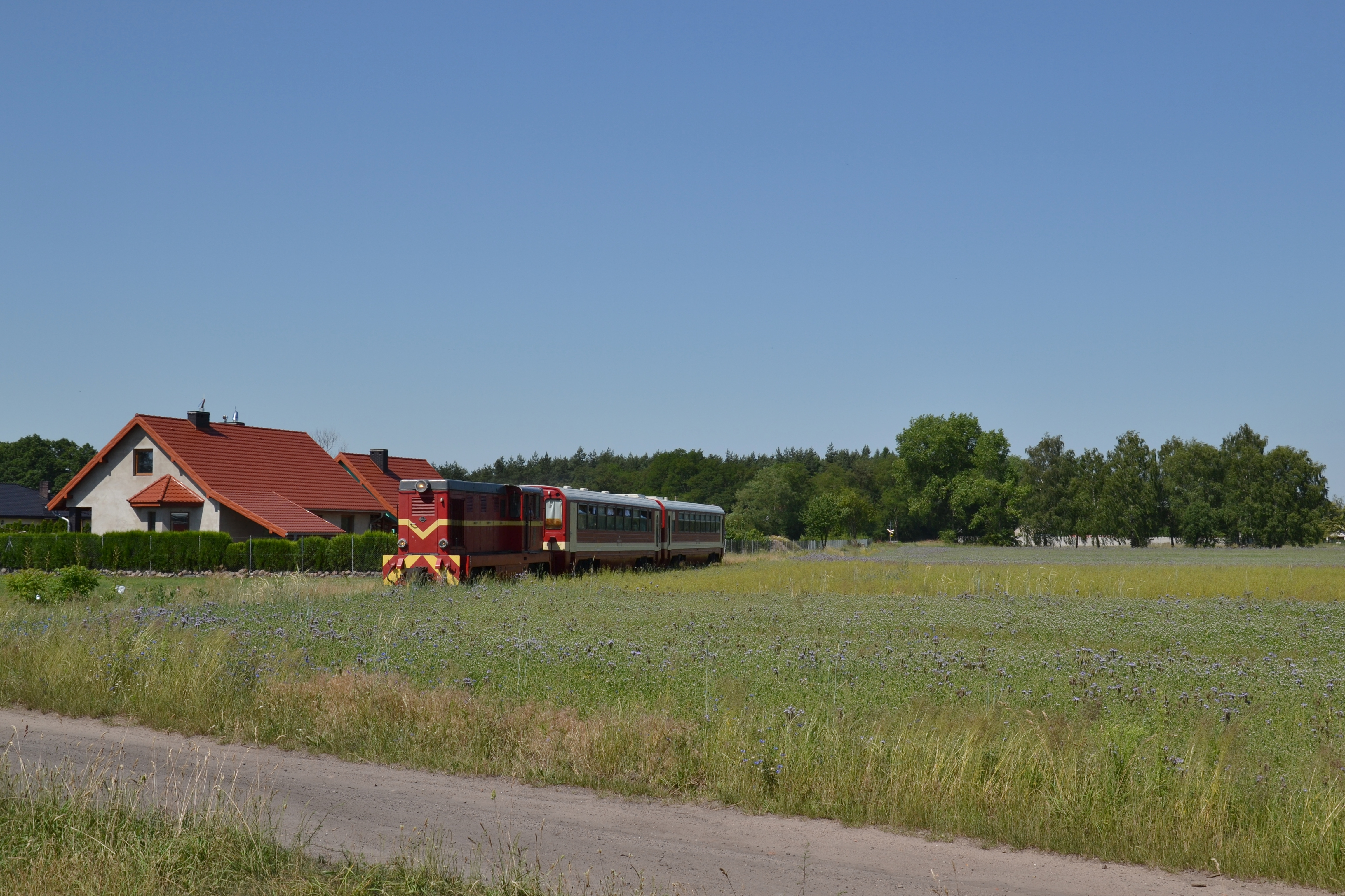 Lxd2-369 Gnieźnieńskiej Kolei Wąskotorowej z pociągiem relacji Gniezno Wąsk.- Ostrowo Stare przejeżdża przez Strzyżewo Witkowskie